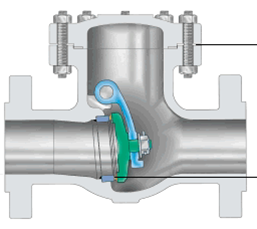 تصویر آموزشی شیر یکطرفه